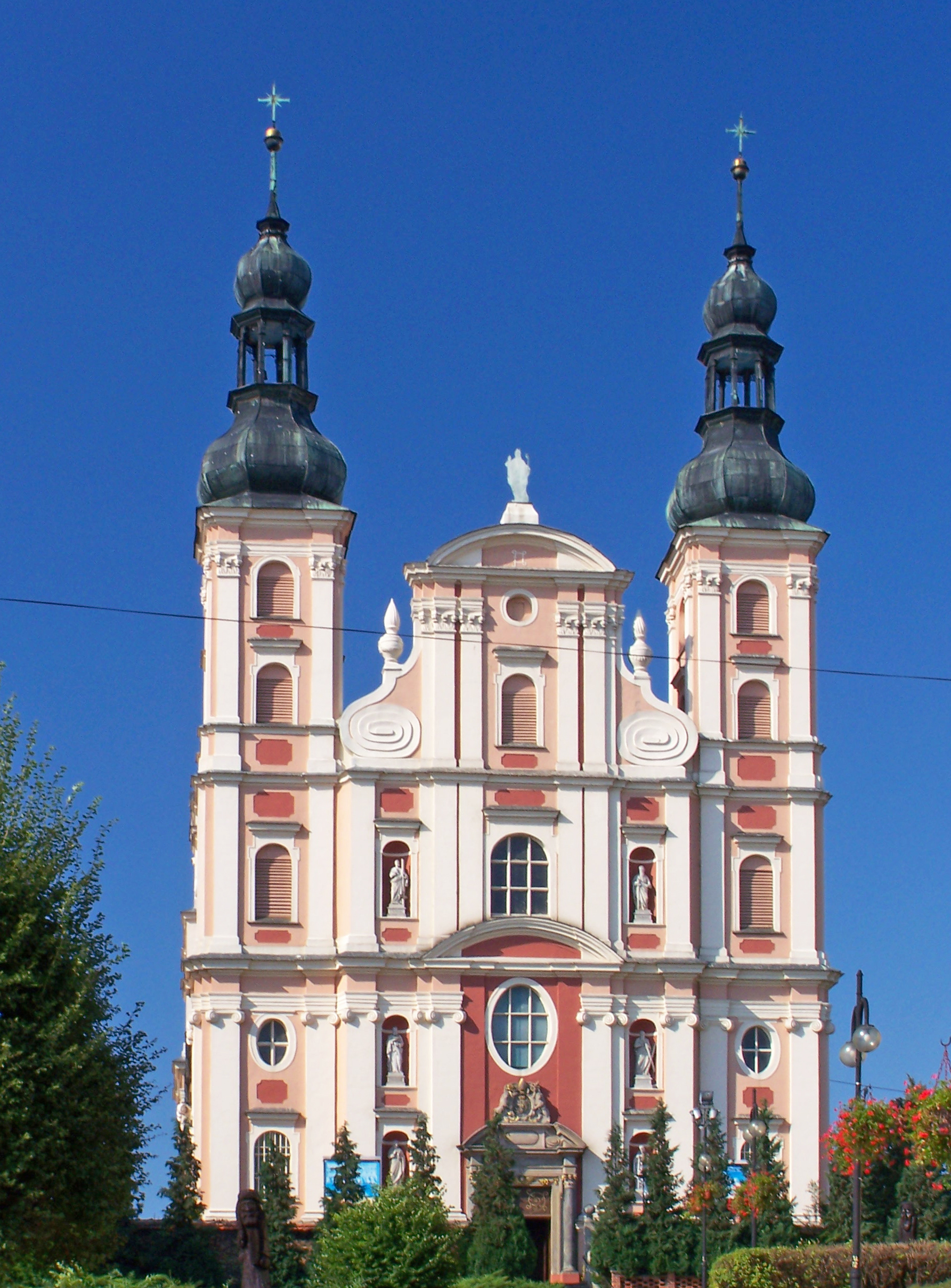 Die Stiftskirche von Ottmachau.